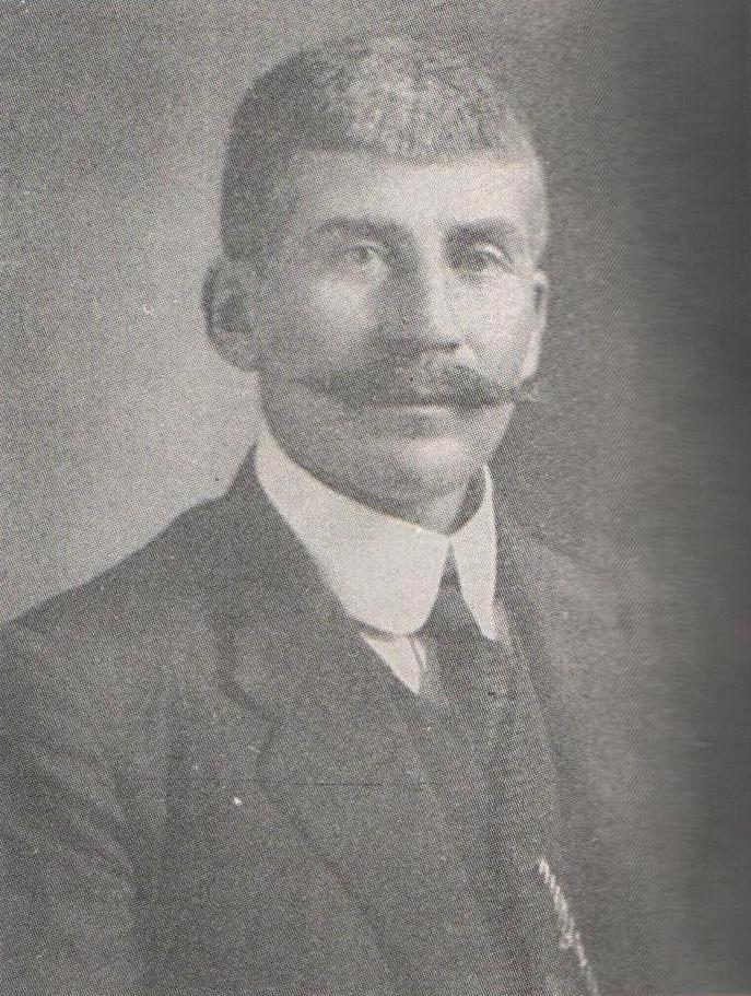 General Ambrosio Figueroa; militar maderista y gobernador de Morelos